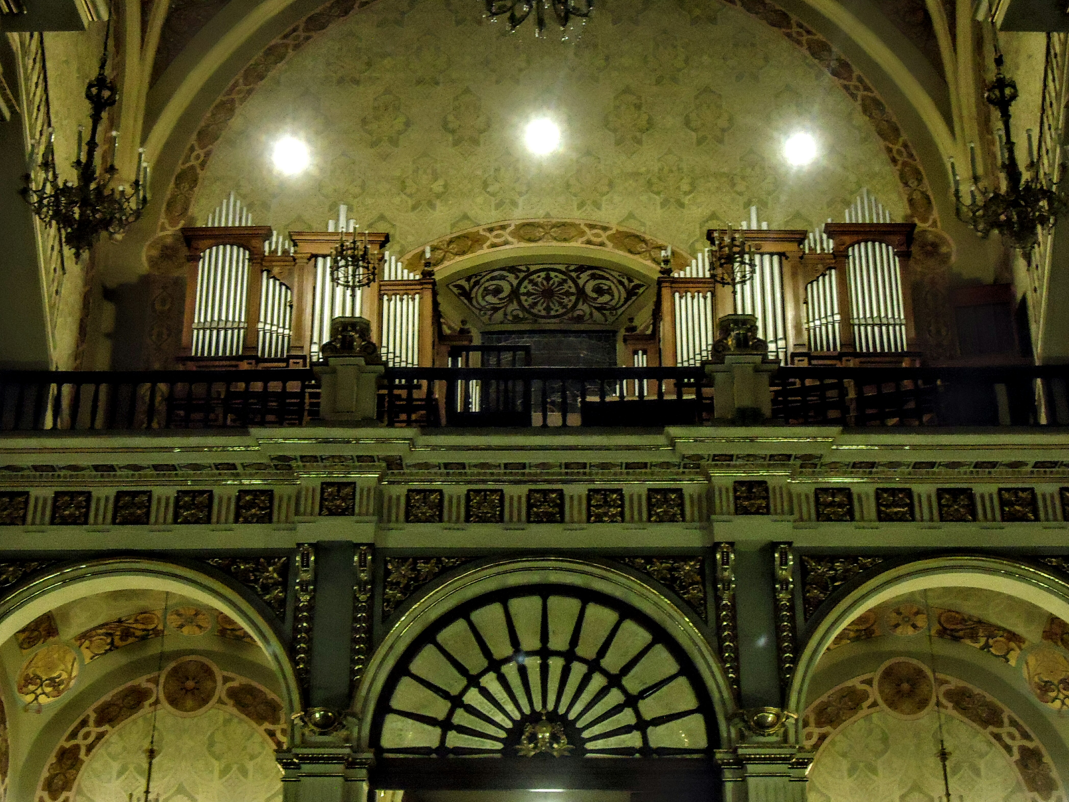 Órgano Tubular.